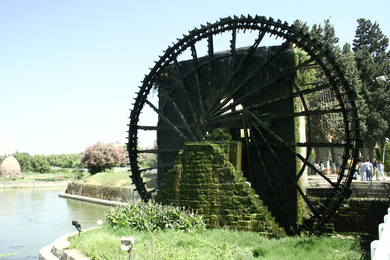 Koła w Hamie